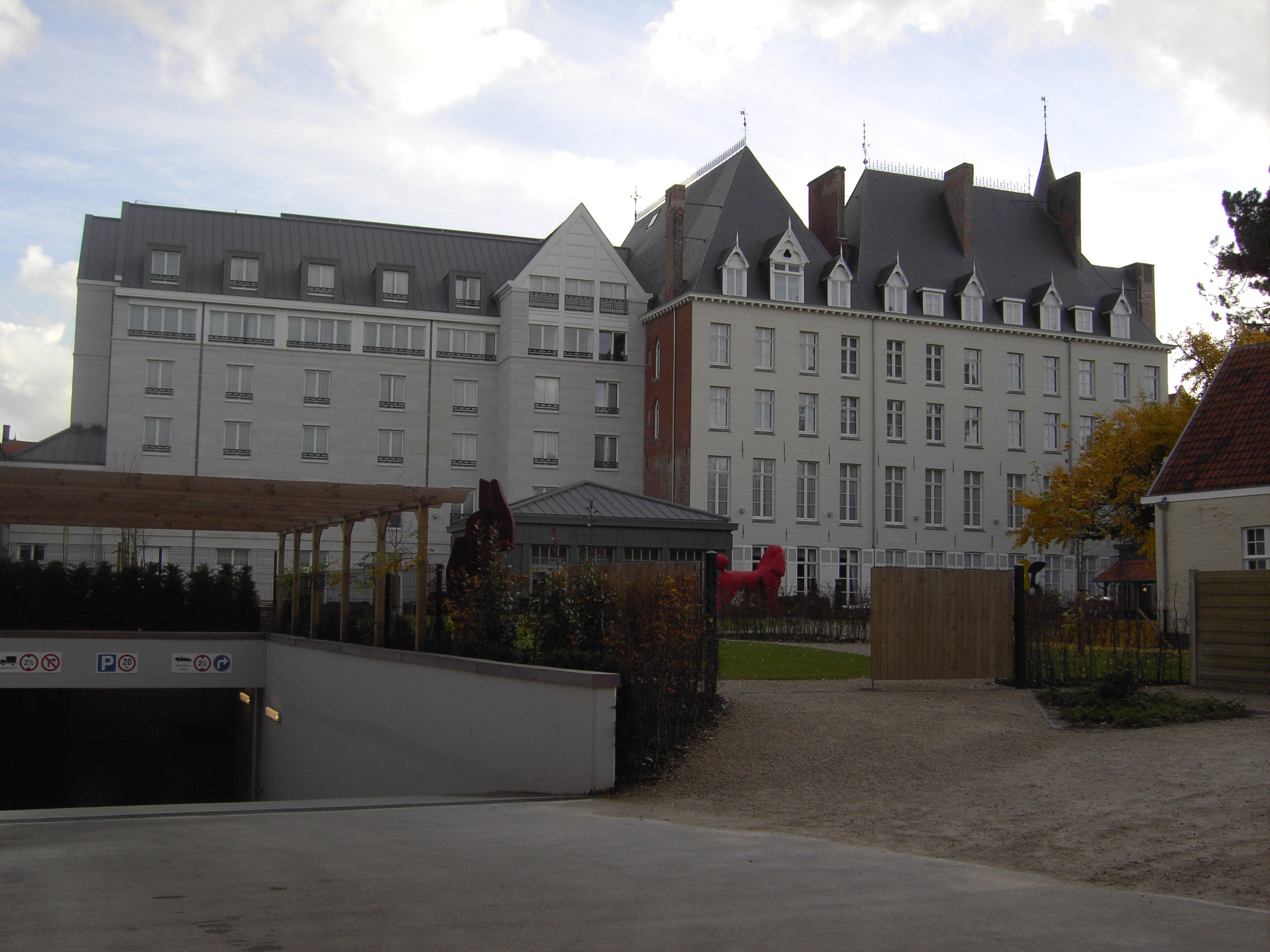 Prinsenhof - Moerstraat - Brugge - West-Vlaanderen - Belgium